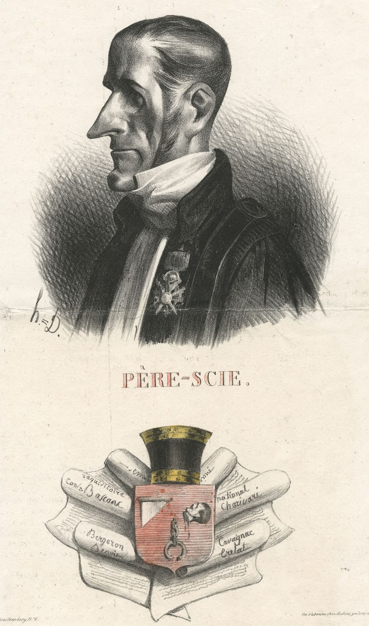 Jean-Charles Persil, né à Condom (Gers) le 13 octobre 1785 et mort à Antony (Hauts-de-Seine) le 10 juillet 1870, est un homme politique français. Il fut ministre de la Justice et des Cultes sous la monarchie de Juillet (1834-1837) puis pair de France (1839) et conseiller d'État (1852). La Caricature N° 127 Pl. 264, 1833